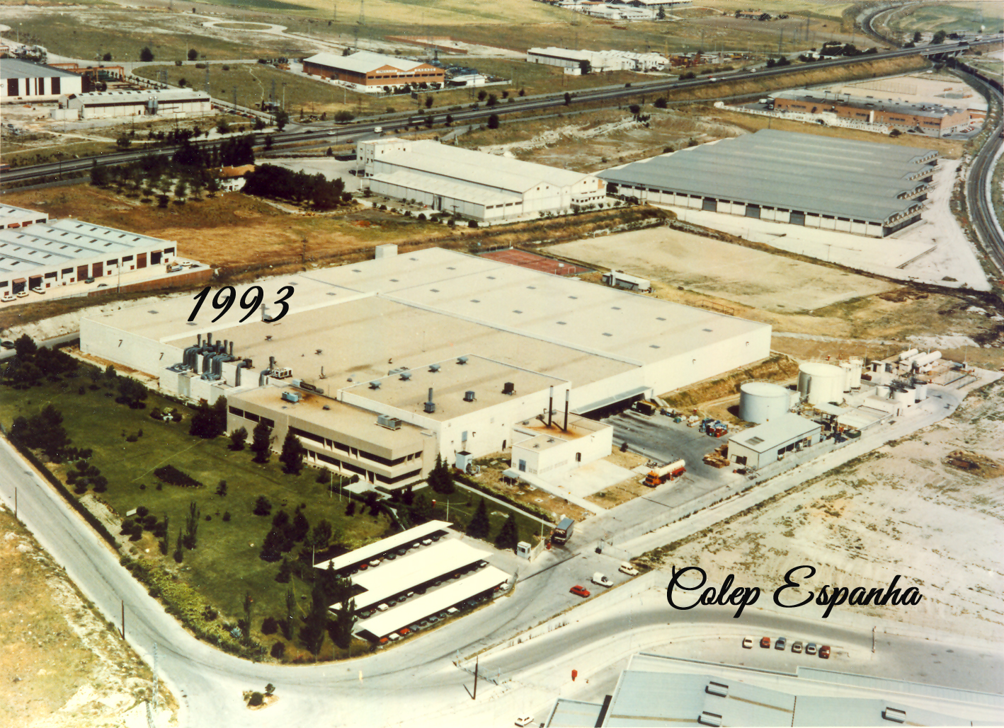 Fotografia da COLEP Espanha em 1993